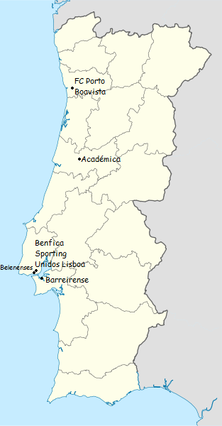 carte des clubs du championnat du portugal de football de première division de 1940-1941